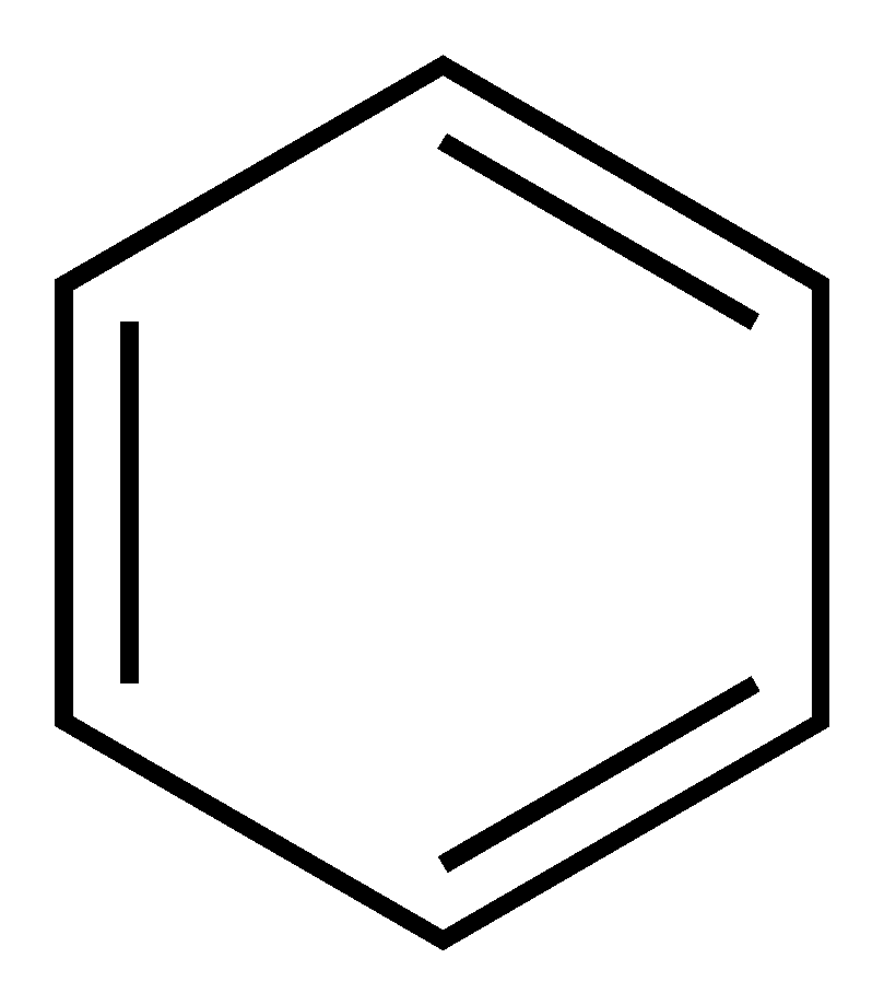 Benzol lb 2d